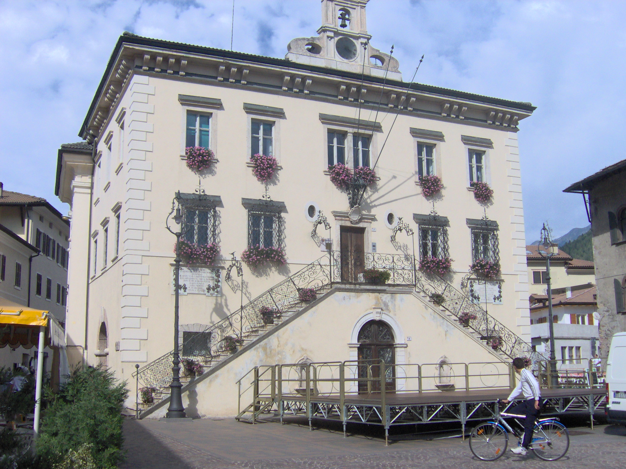 Image della provincia di Trento